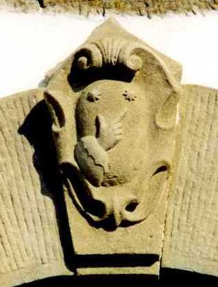 Villa di Carraia, Siemma Manni sul portale della villa